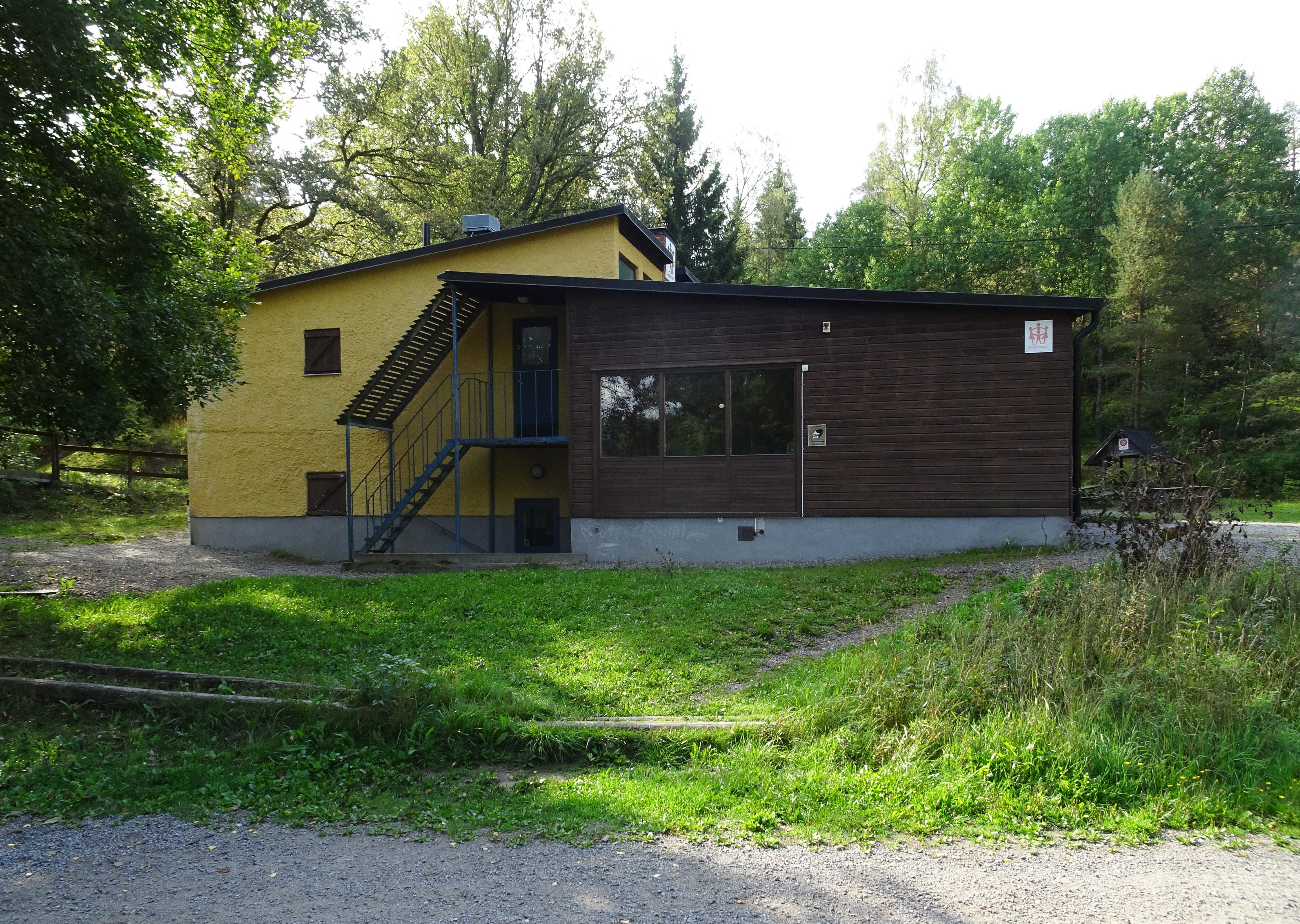 Örnboet, Unga Örnarnas fritidsgård, arkitekt Åke E. Lindqvist